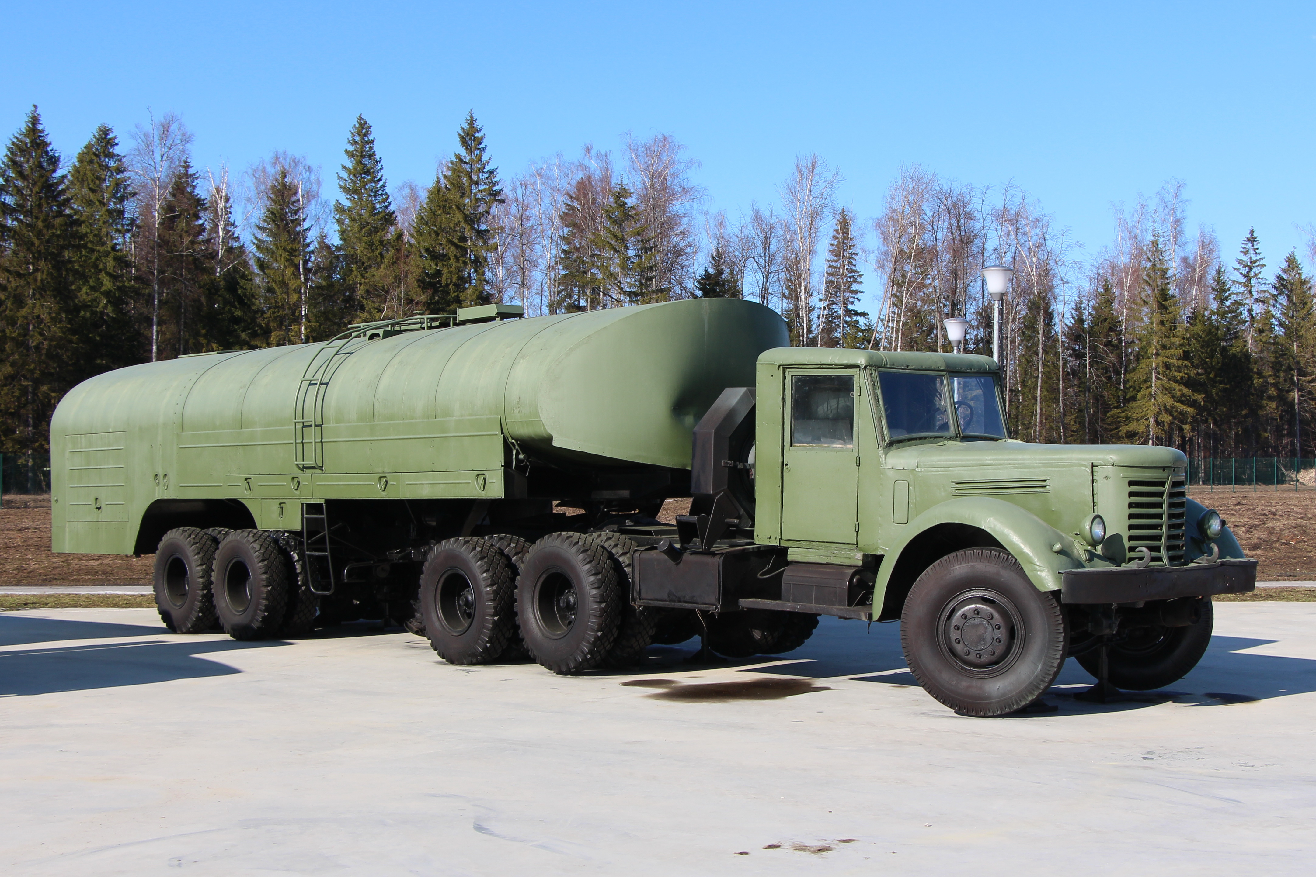 ЯАЗ-210Д в составе с полуприцепом ЧМЗАП-5204М топливозаправщика ТЗ-22. Музейная площадка ФГАУ ВППКиО ВС РФ Патриот.